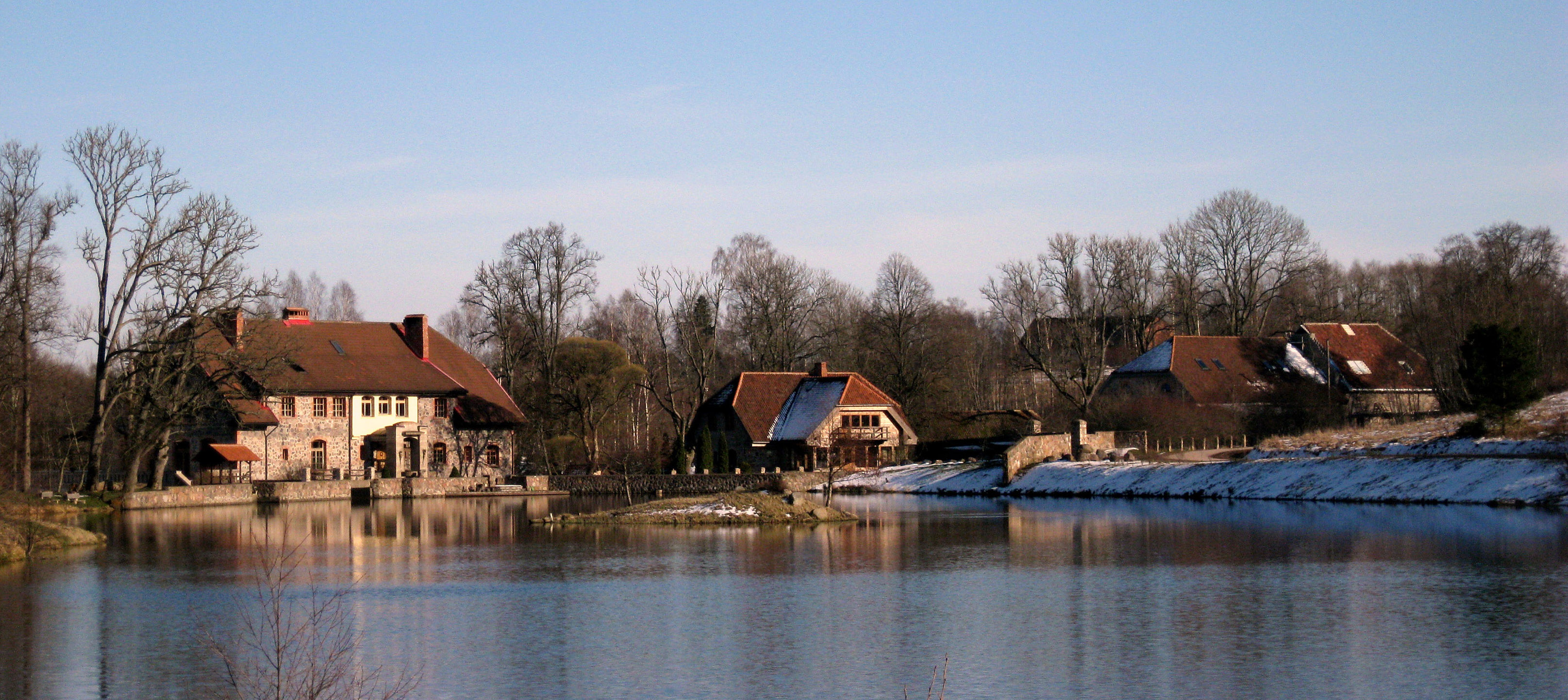 Mazsaliju Watermill